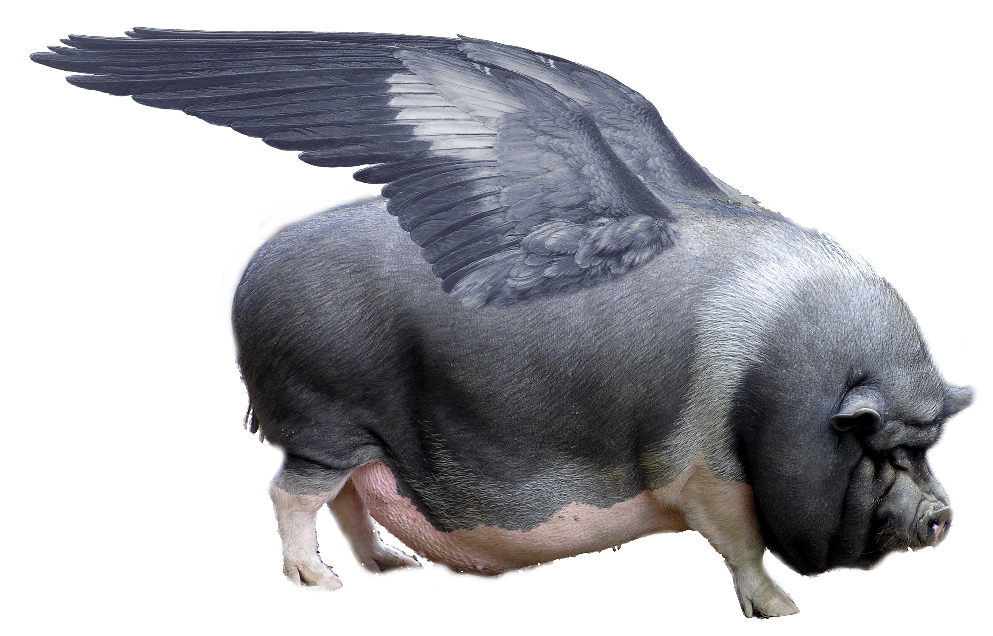 Sus scrofa avionica